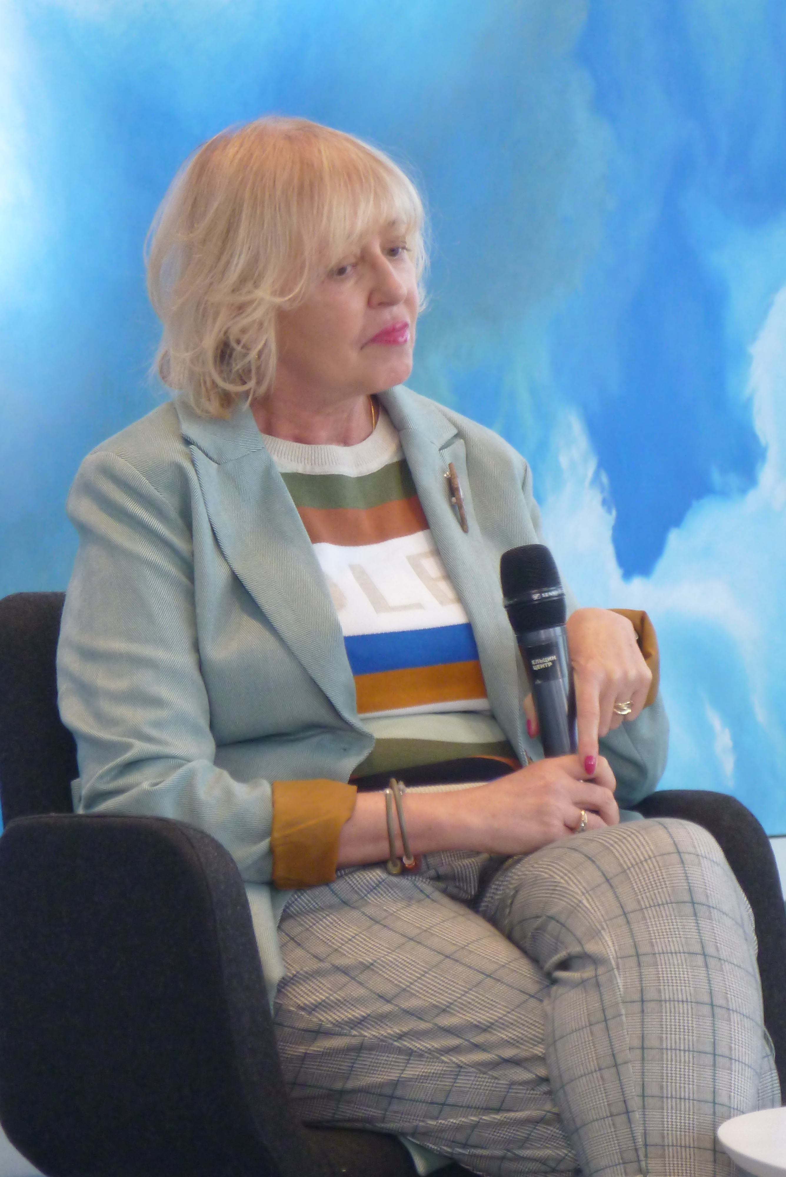 Елена Дикун, бывшая журналистка кремлевского пула из Общей газеты в Ельцин-центре 29 июня 2019 года